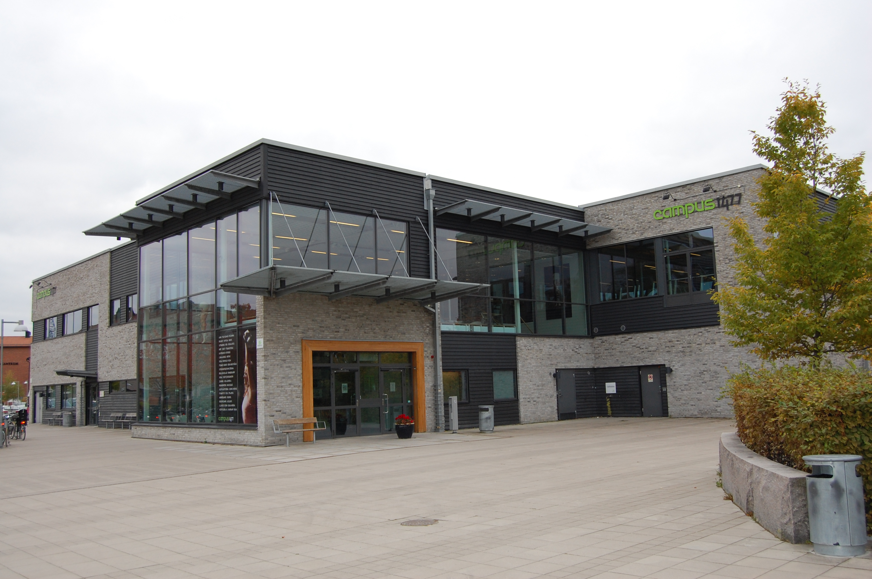 Uppsala universitets studentgym Campus 1477, lokal invid Blåsenhus